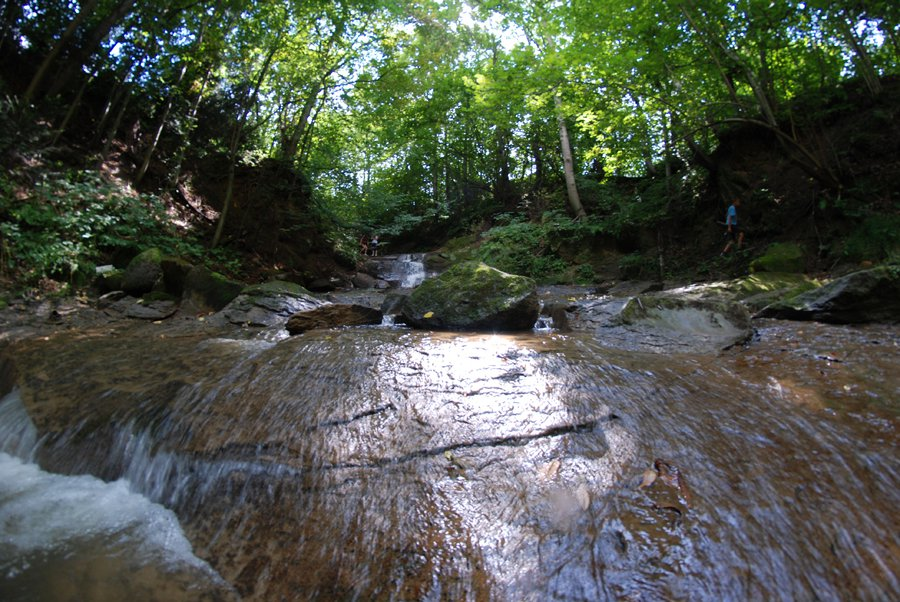 Ruda Kameralna widok potoku Rudzanka